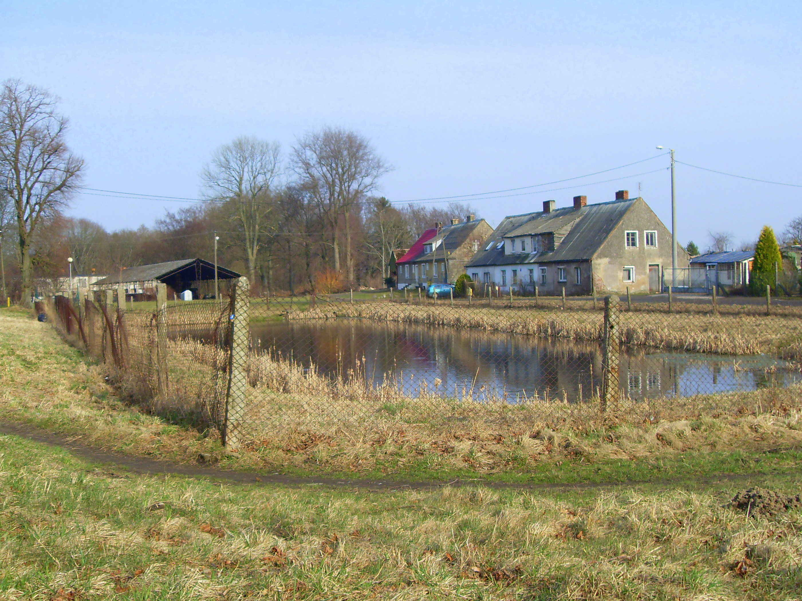 dawny zbiornik przeciwpożarowy pełniący dzisiaj funkcję stawu w Gąskowie (zachodniopomorskie).